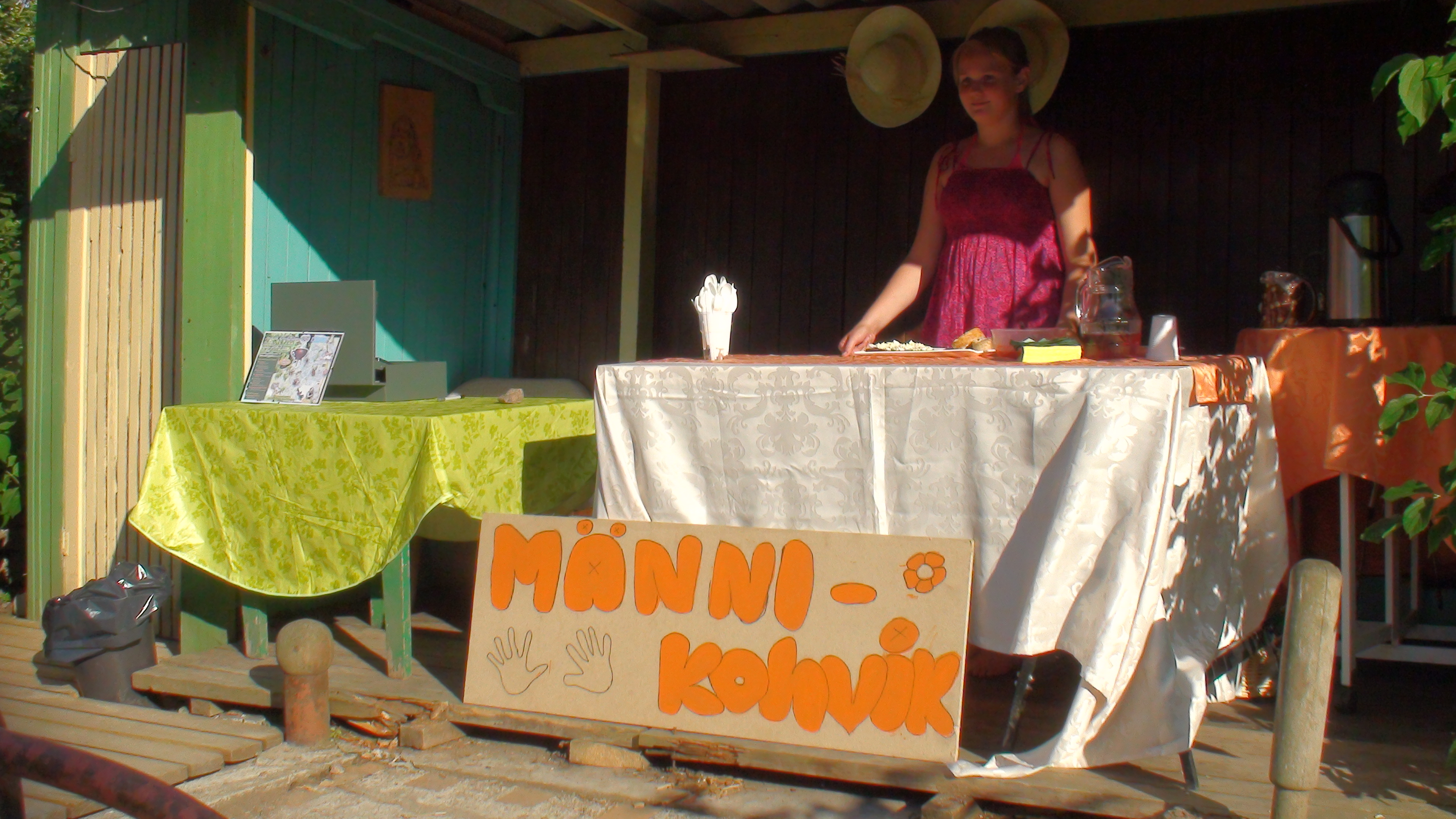 Männi kohvik avati Aruküla kohvikutepäeval 2013 Männiku tee 11 koduaias.